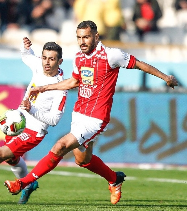 محسن ربیع‌خواه در حال بازی برای تیم فوتبال پرسپولیس